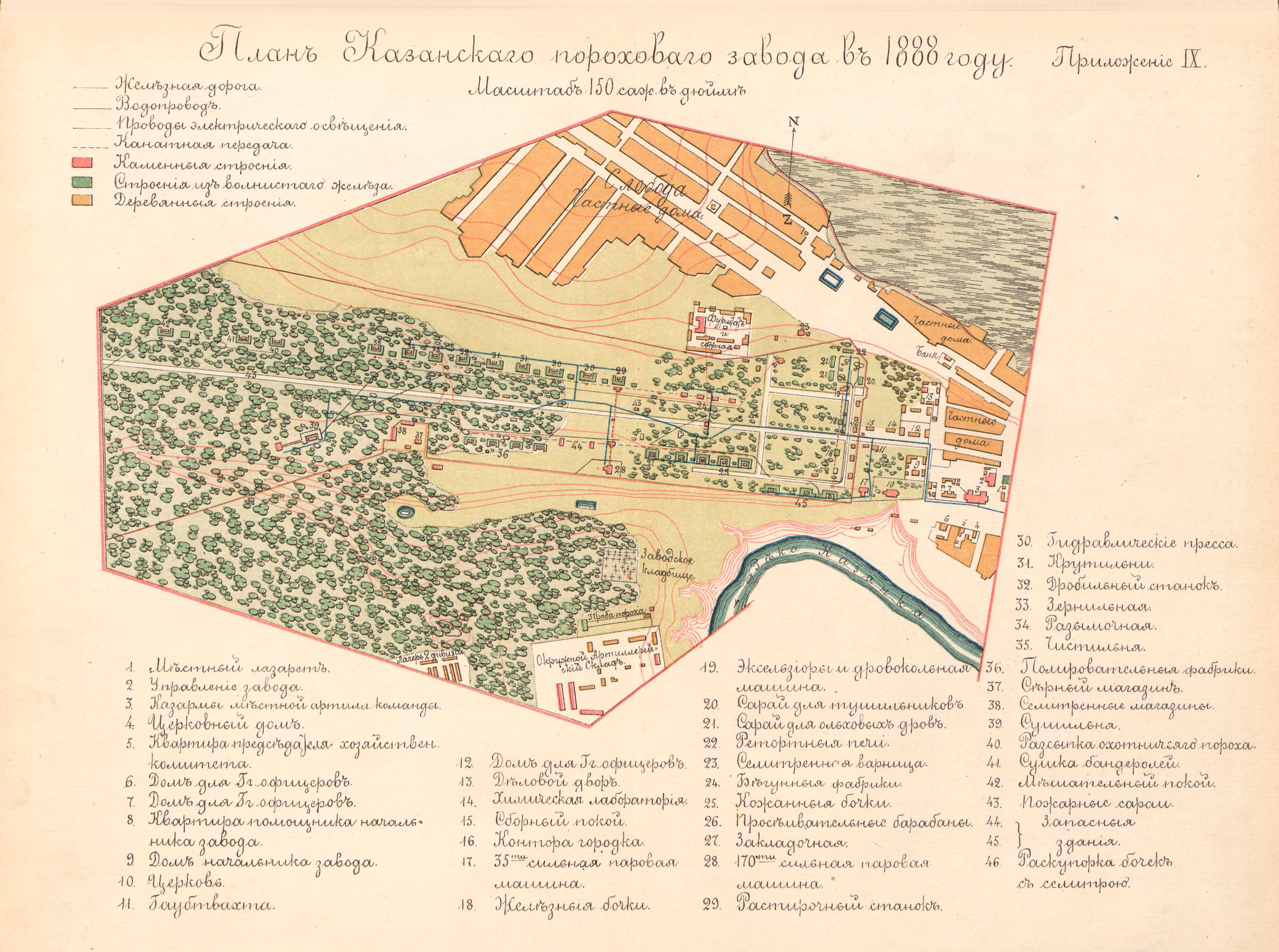 План Казанского порохового завода в 1888 году. Из книги: Глинский А. С. 100 лет Казанского порохового завода. - СПб.: Типография "Артиллерийского Журнала", 1888. - Приложение IX.